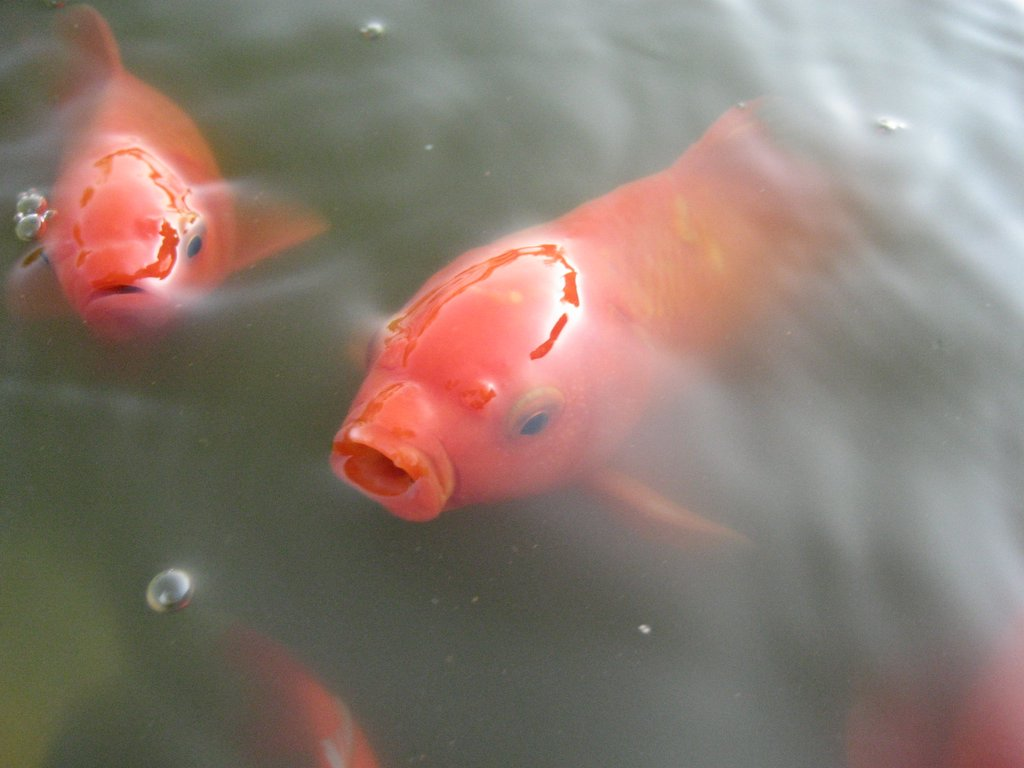 Carassius auratus auratus boqueando en la superficie Goldfishes 11. May 2006 Photogaphed by Tiefflieger